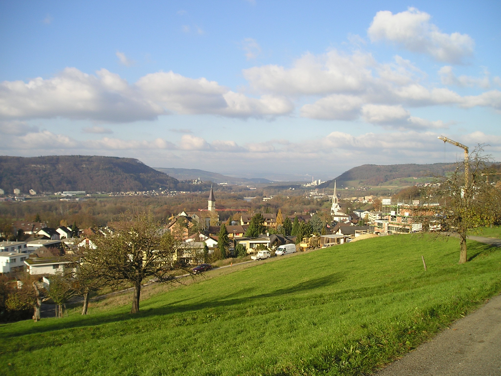 Blick von der Geisslistrasse auf Gebenstorf, Schweiz